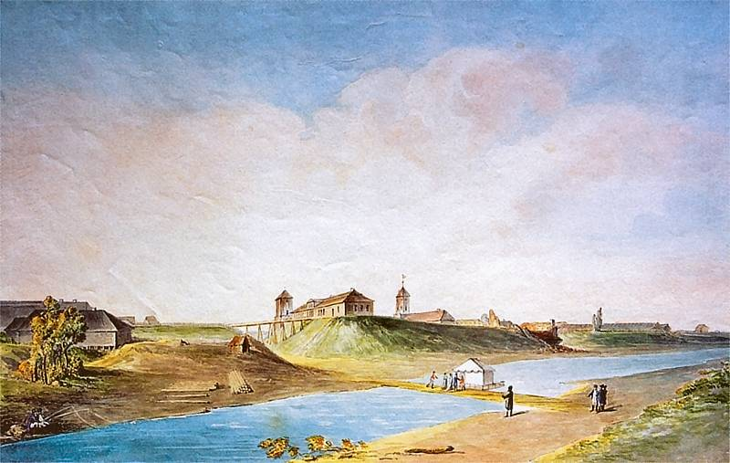 Józef Peszka